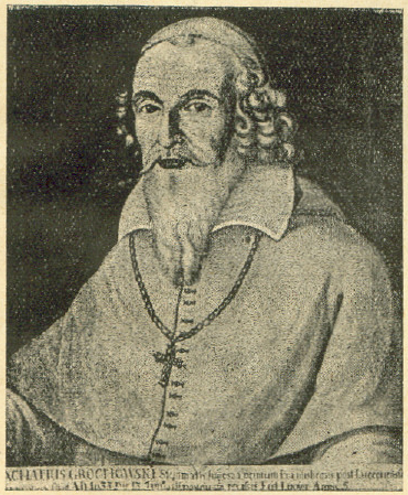 Achacy Grochowski, bishop of Lutsk